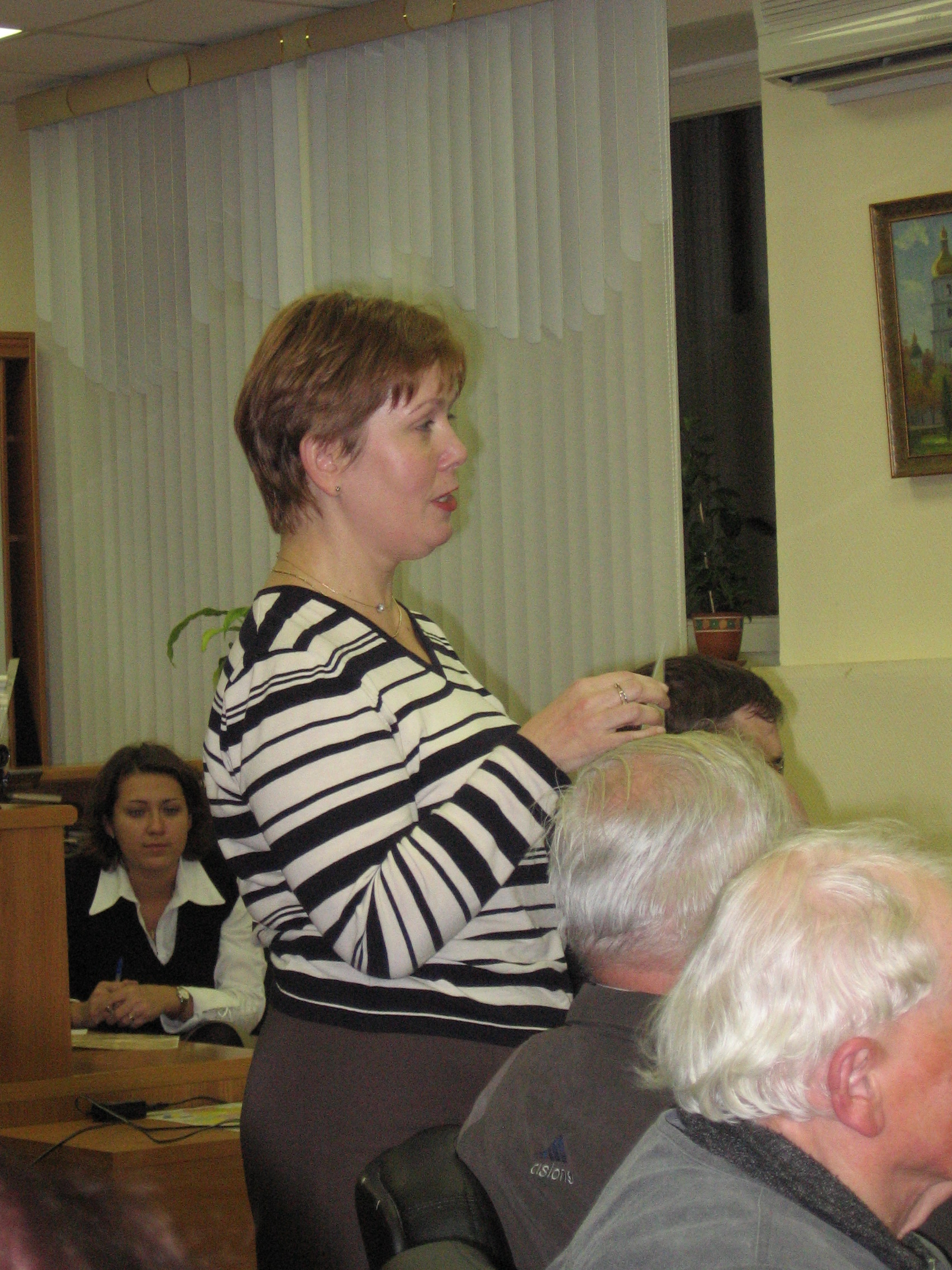 Наталия Шарина, директор Библиотеки украинской литературы в Москве